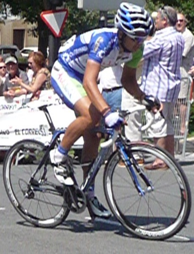 Juan José Lobato en el sprint final del 66 Circuito de Getxo